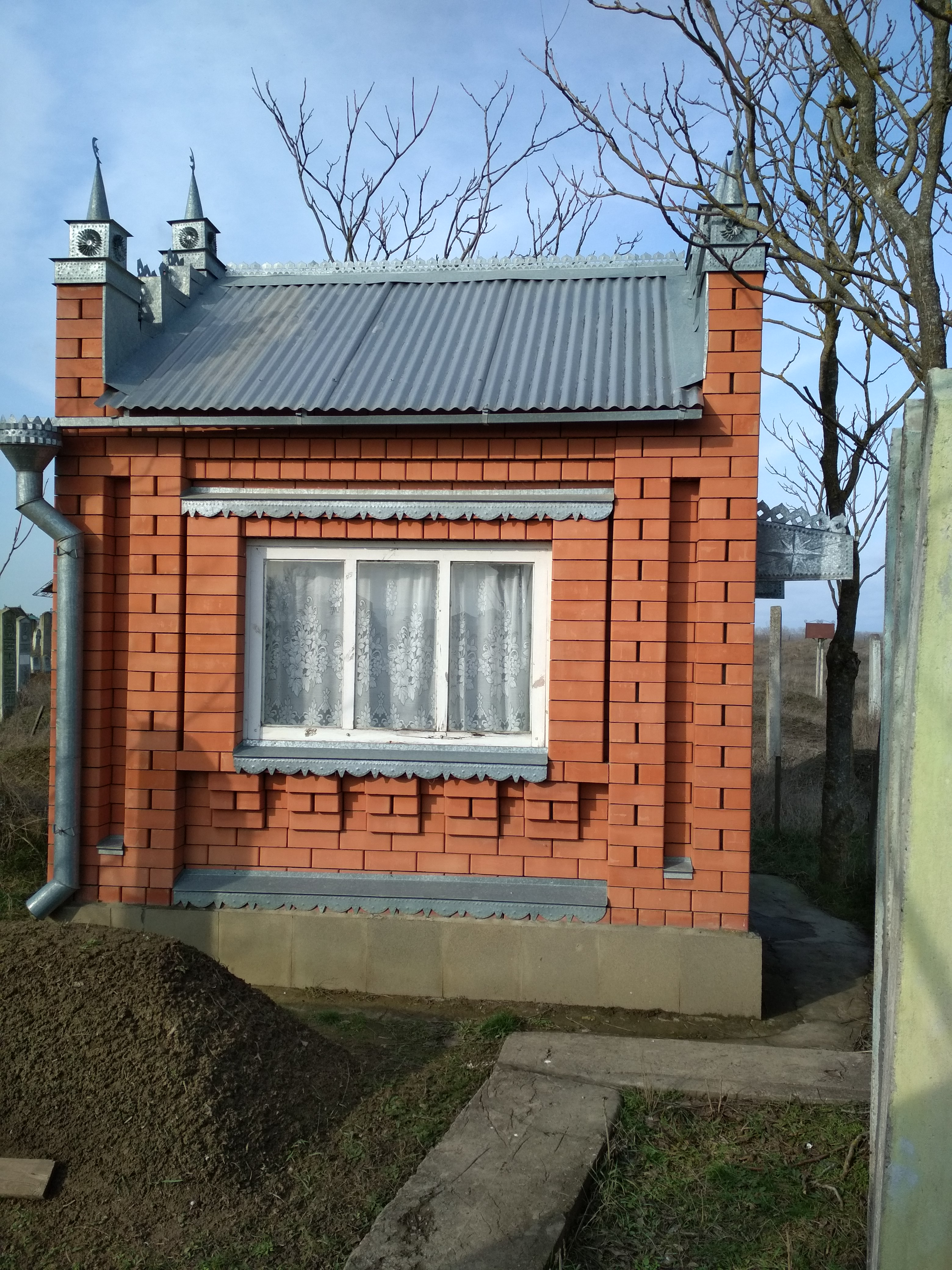 Нохчийн: ЧІулга-Юртара Манин зиярат